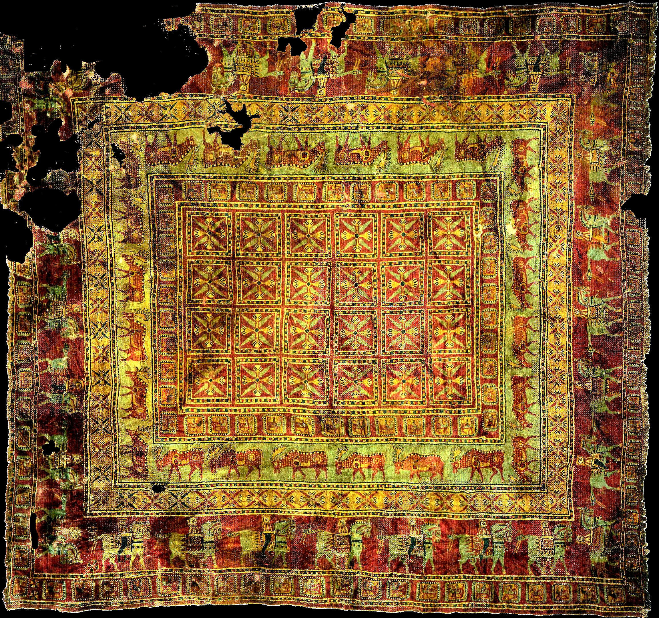 Pazyryk tapijt. ± 300/500 v.chr.